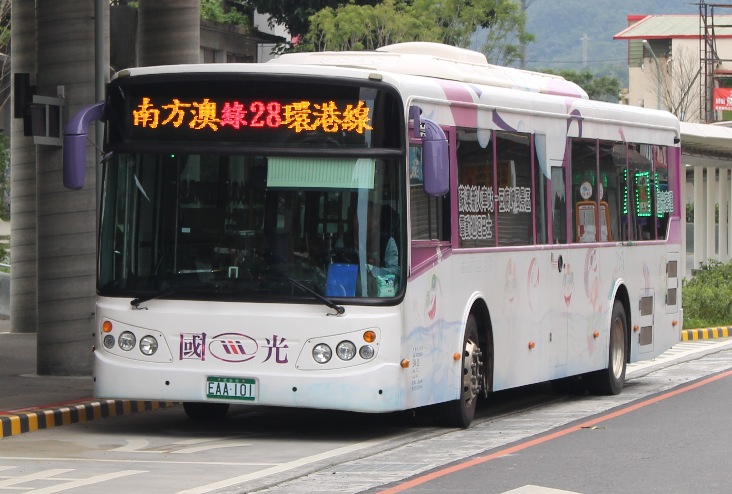 國光客運華德動能科技純電動低地板綠能公車EAA-101 宜蘭縣公車綠28線 停靠蘇澳轉運站